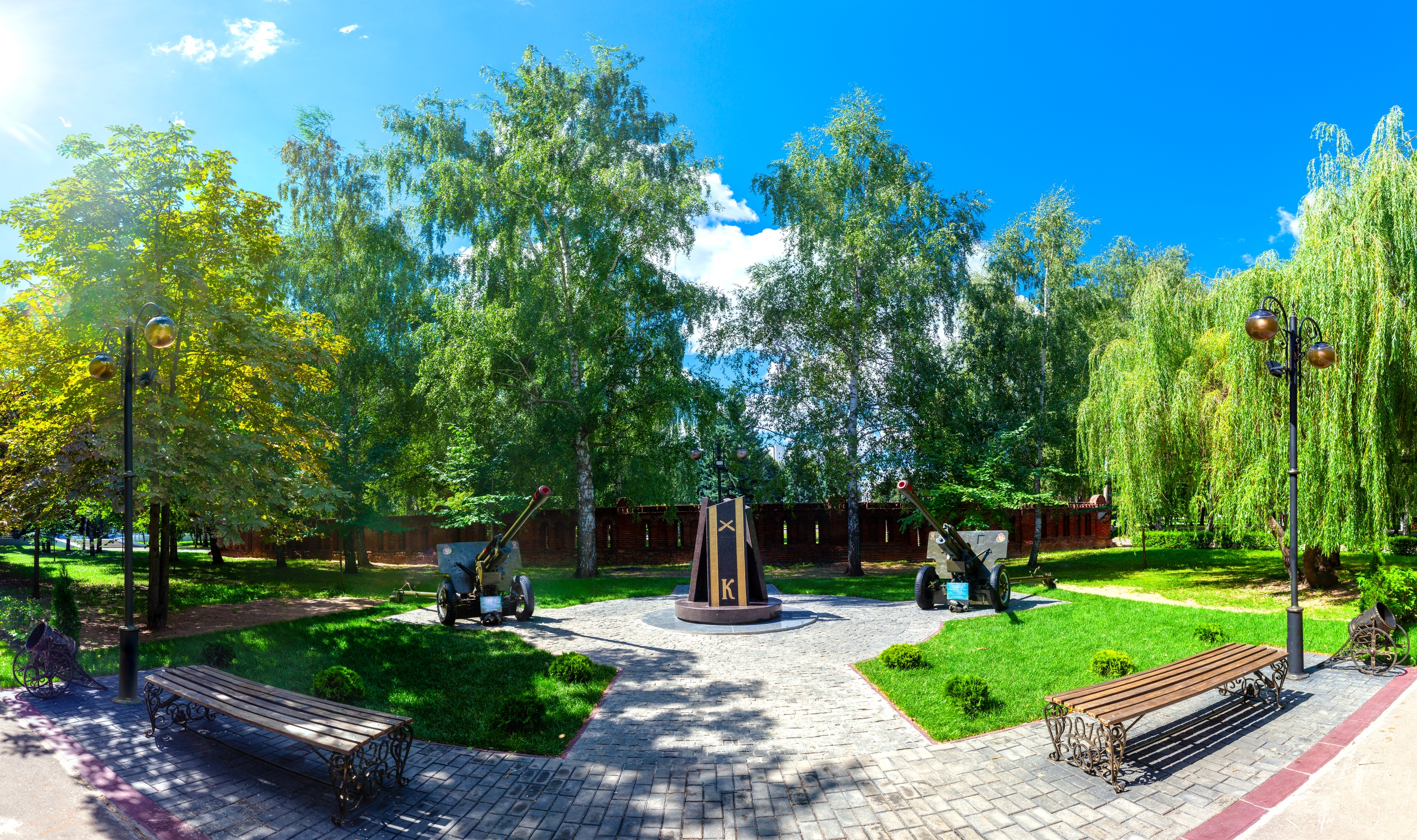 Памятный Знак Коломенским Курсантам